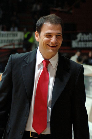 Ferdinando Gentile